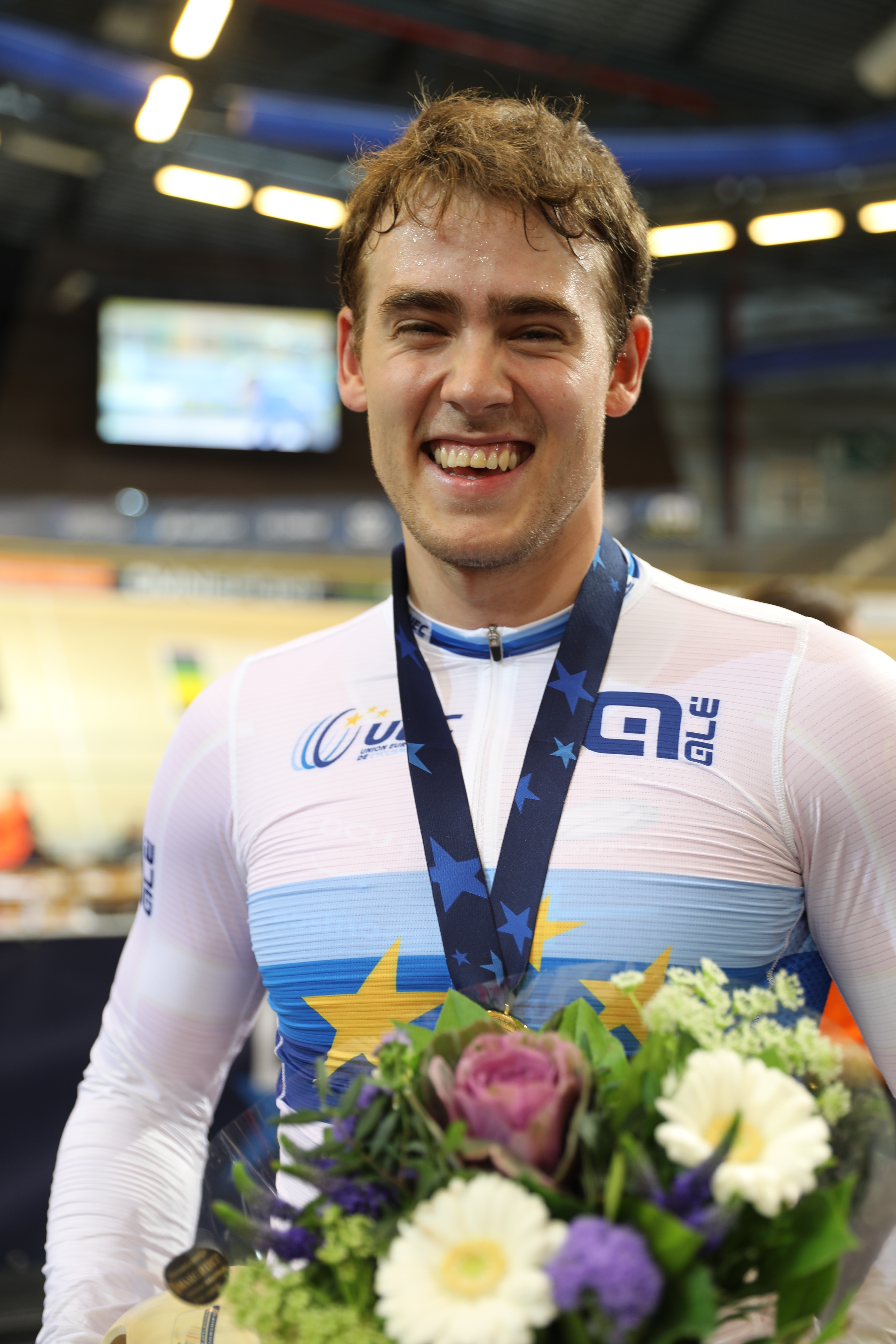 Rasmus Pedersen, dänischer Radsportler (EM-Gold in der Mannschaftsverfolgung 2019)